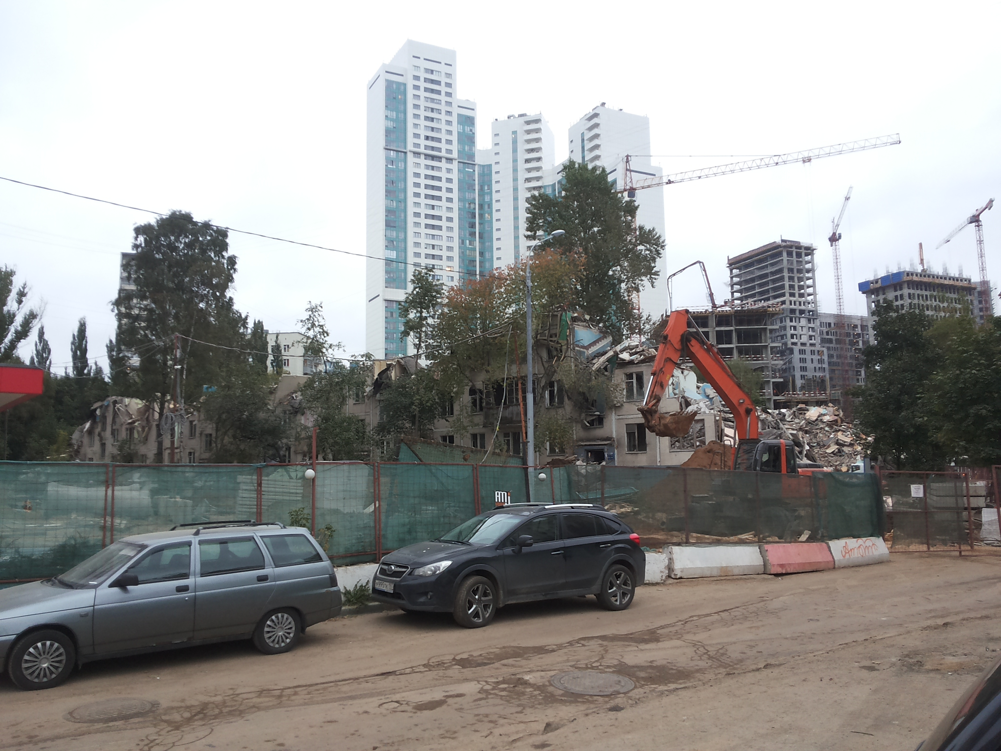 Снесенный в 2017 году в Кунцево дом серии 1605